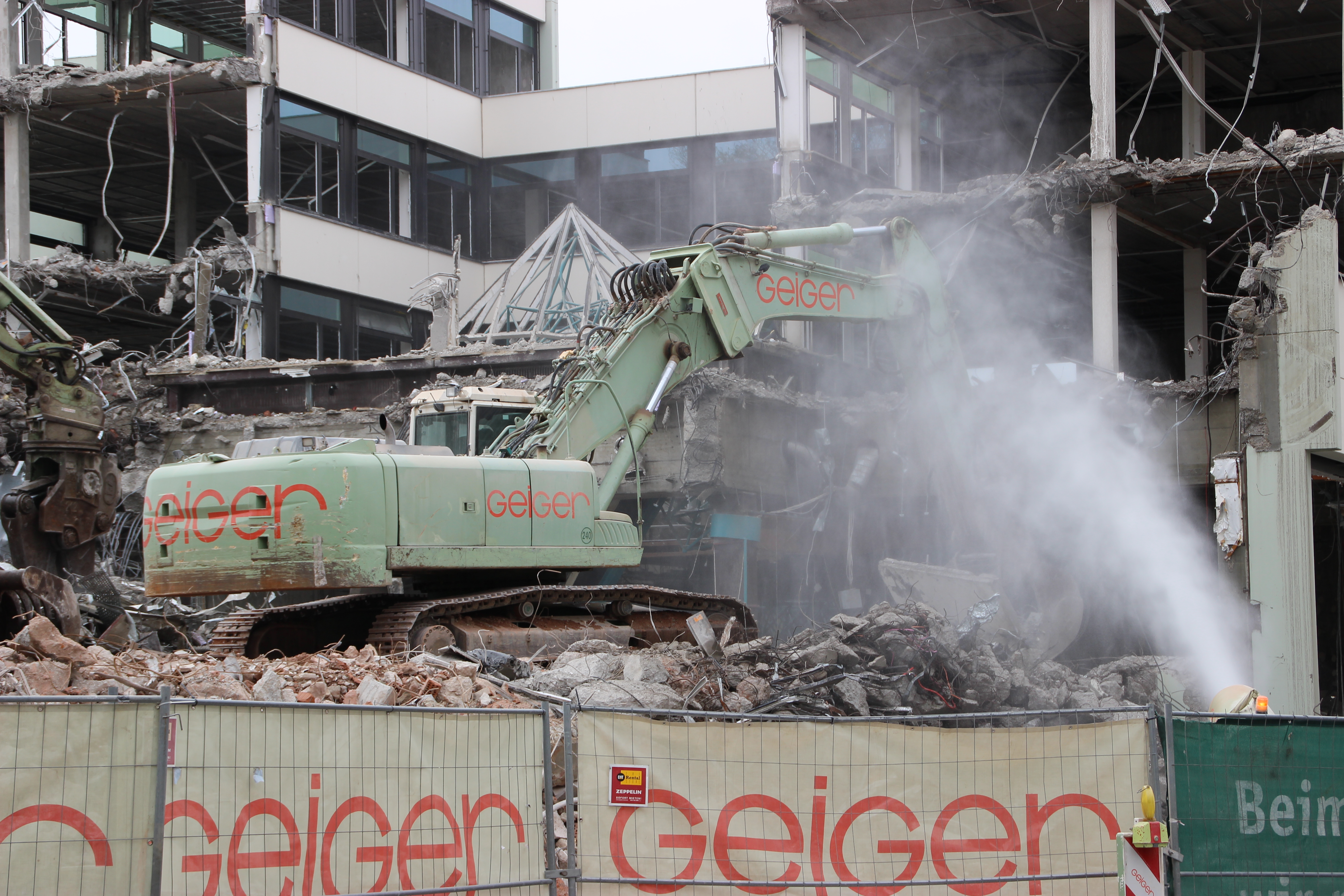 Abbruch der Zentrale von der Sparkasse Allgäu in Kempten